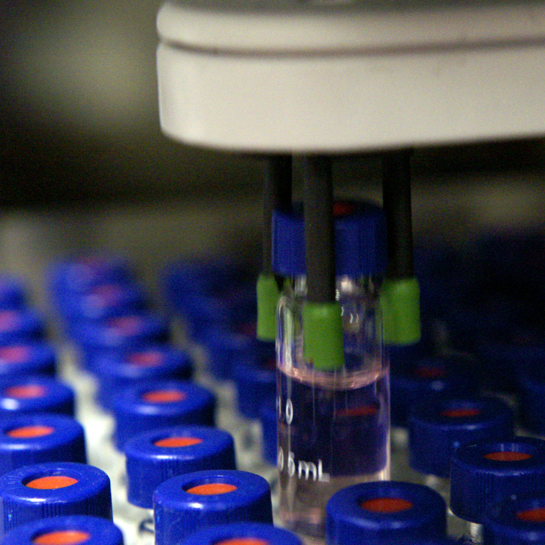 Autosample takes a Vial.